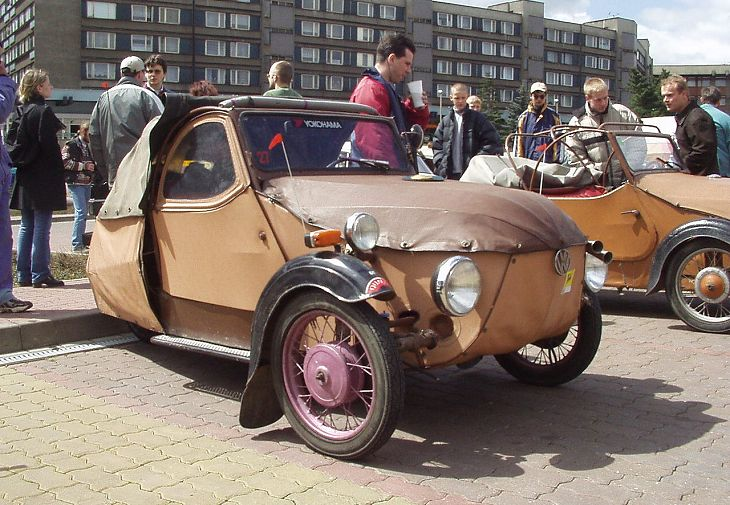 Velorex 16/350, Boskovice (Csehország)